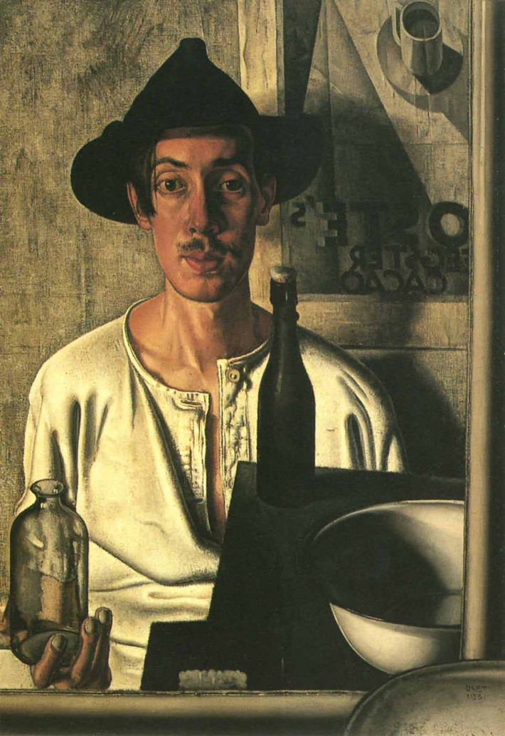 Zelfportret